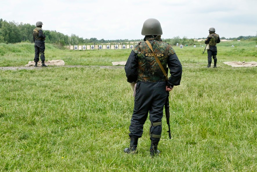 Відкрите тренування добровольців батальйону Донбас на тренувальній базі Нацгвардії України під Києвом.